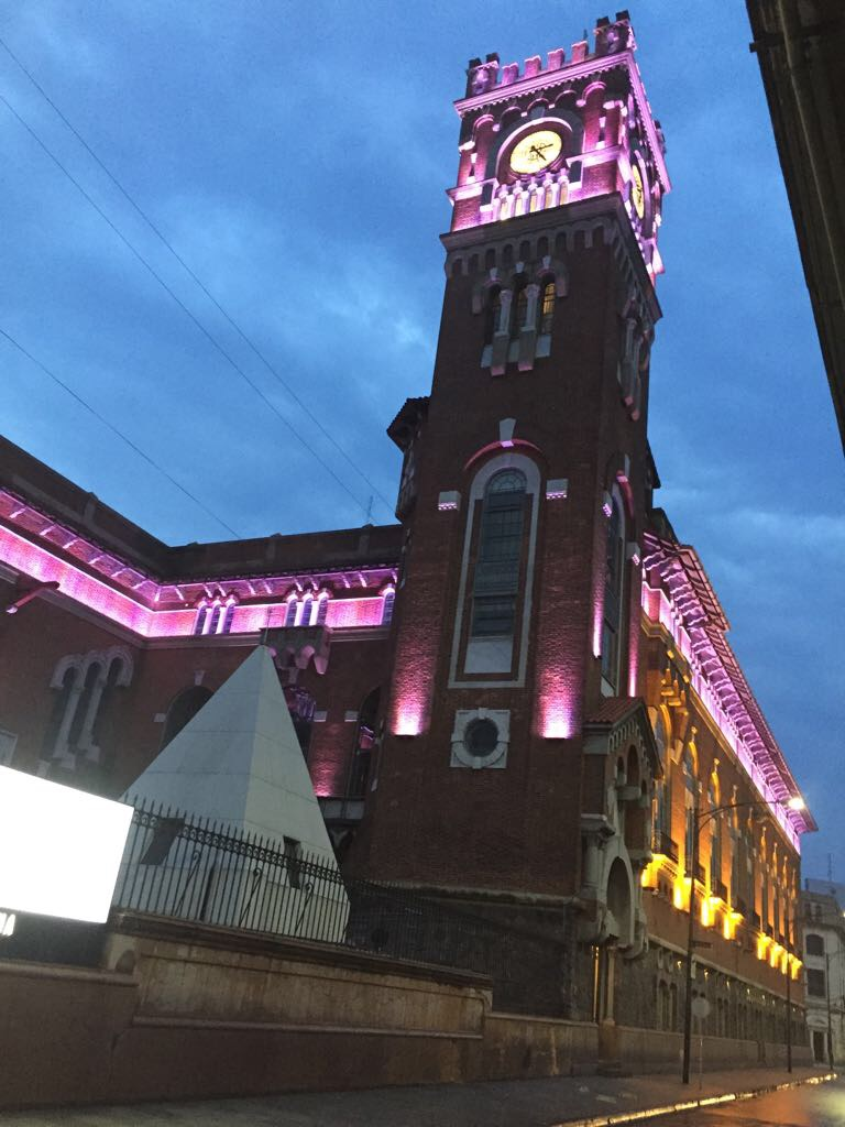 Usina del Arte en mi barrio de La Boca.